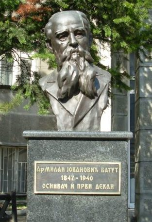 Batutova bista ispred Medicinskog fakulteta, Beograd, Srbija. Slikao Goldfinger